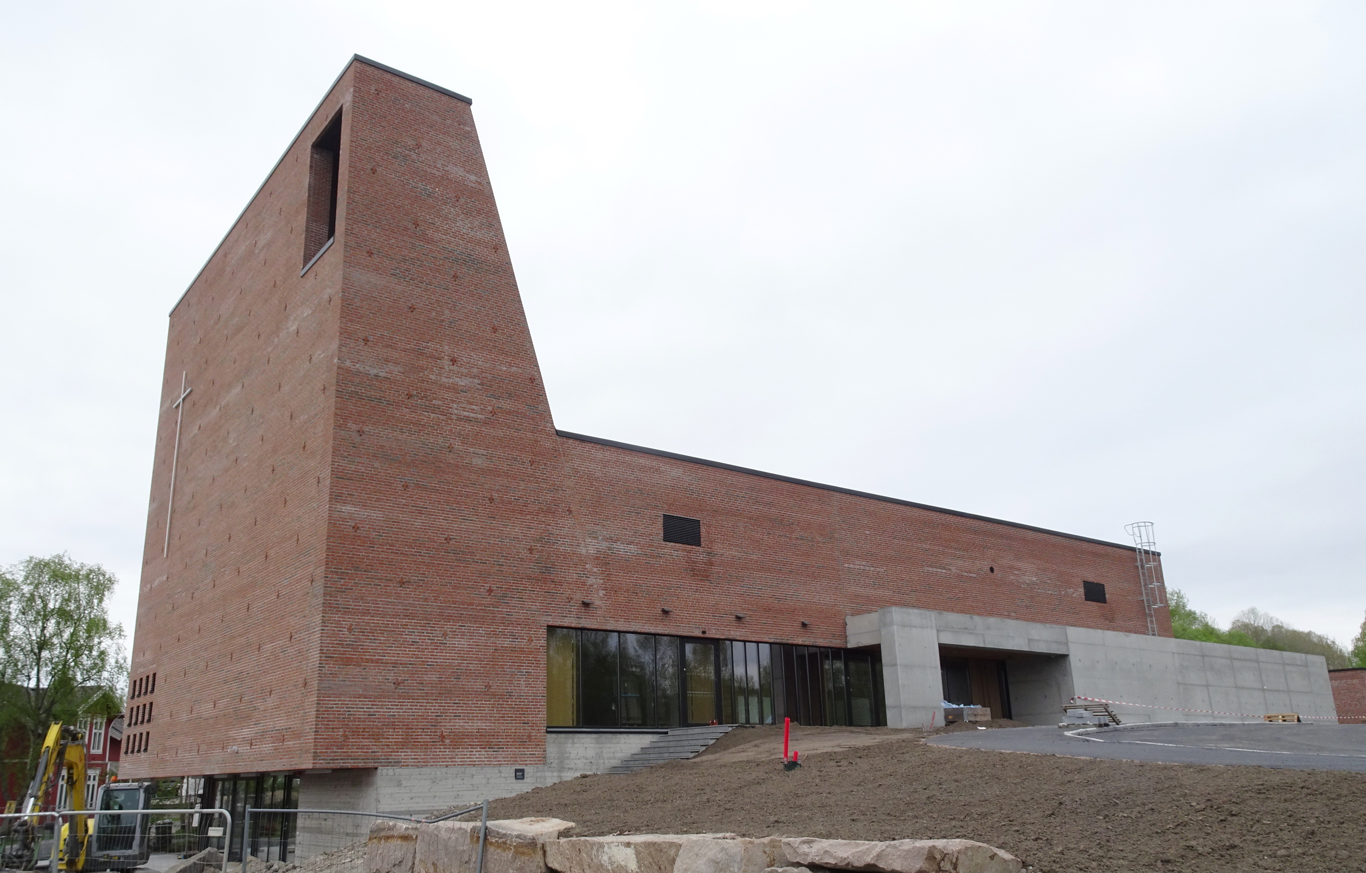 Spikkestad kirke- og kultursenter i mai 2018, et par uker før vigslingen